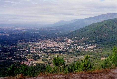 Vista general de Piedralaves.